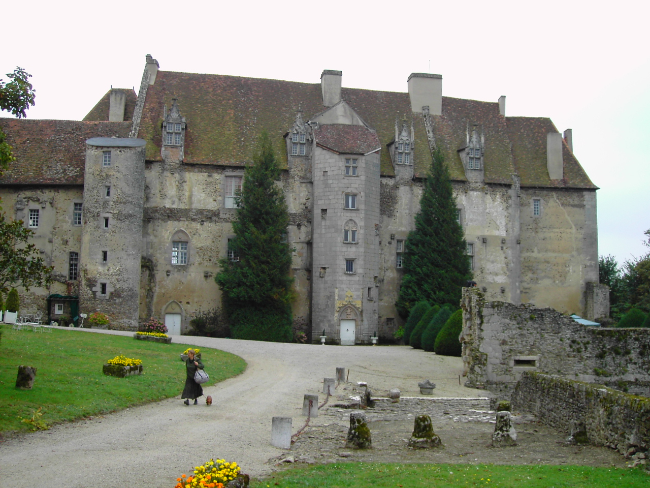 le château de boussac auteur --Michel mans 19 septembre 2006 à 12:03